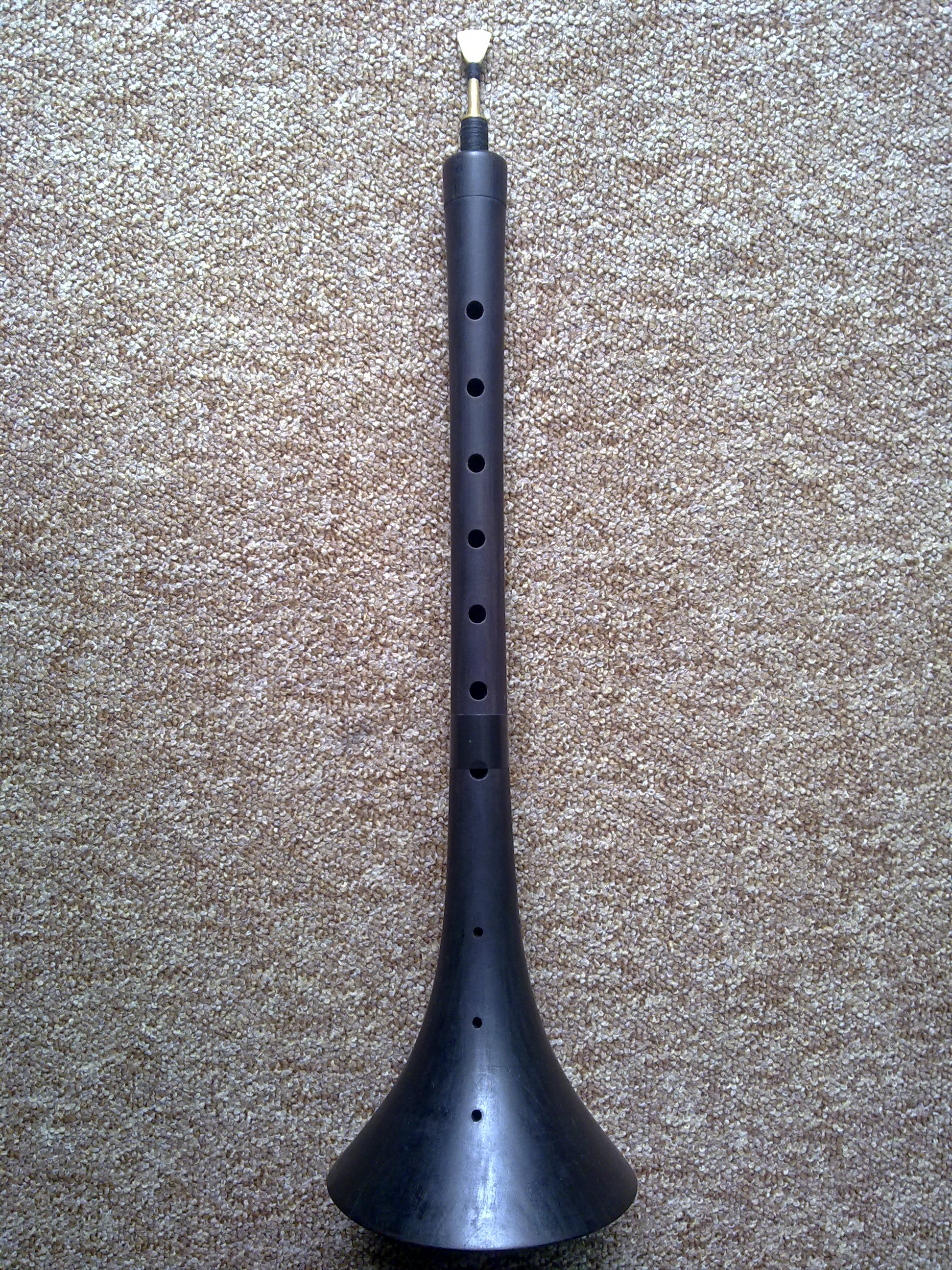 Zurna aus Grenadillholz mit Zunge (dil) und Rohrblatt (kamis) - bereit zum Spielen